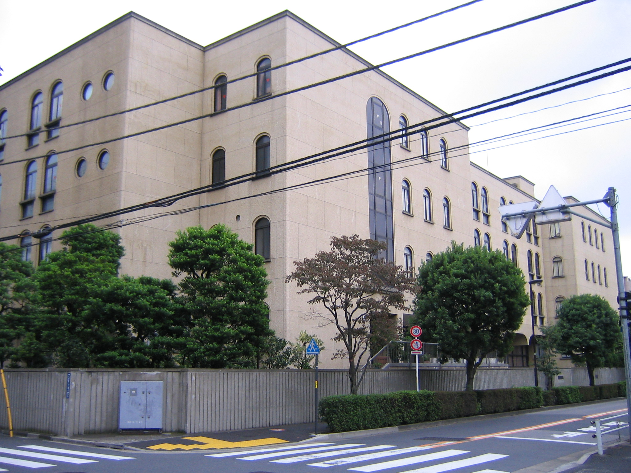 白百合学園校舎